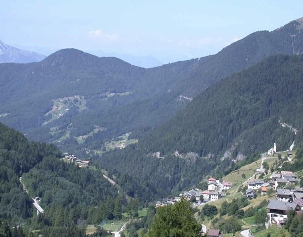 La valle dei Mòcheni, col paese di Palù del Fersina.